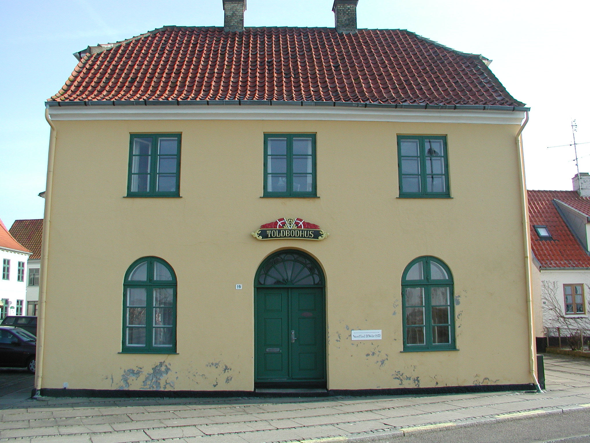 Den tidligere toldkammerbygning i Assens, set lige forfra.